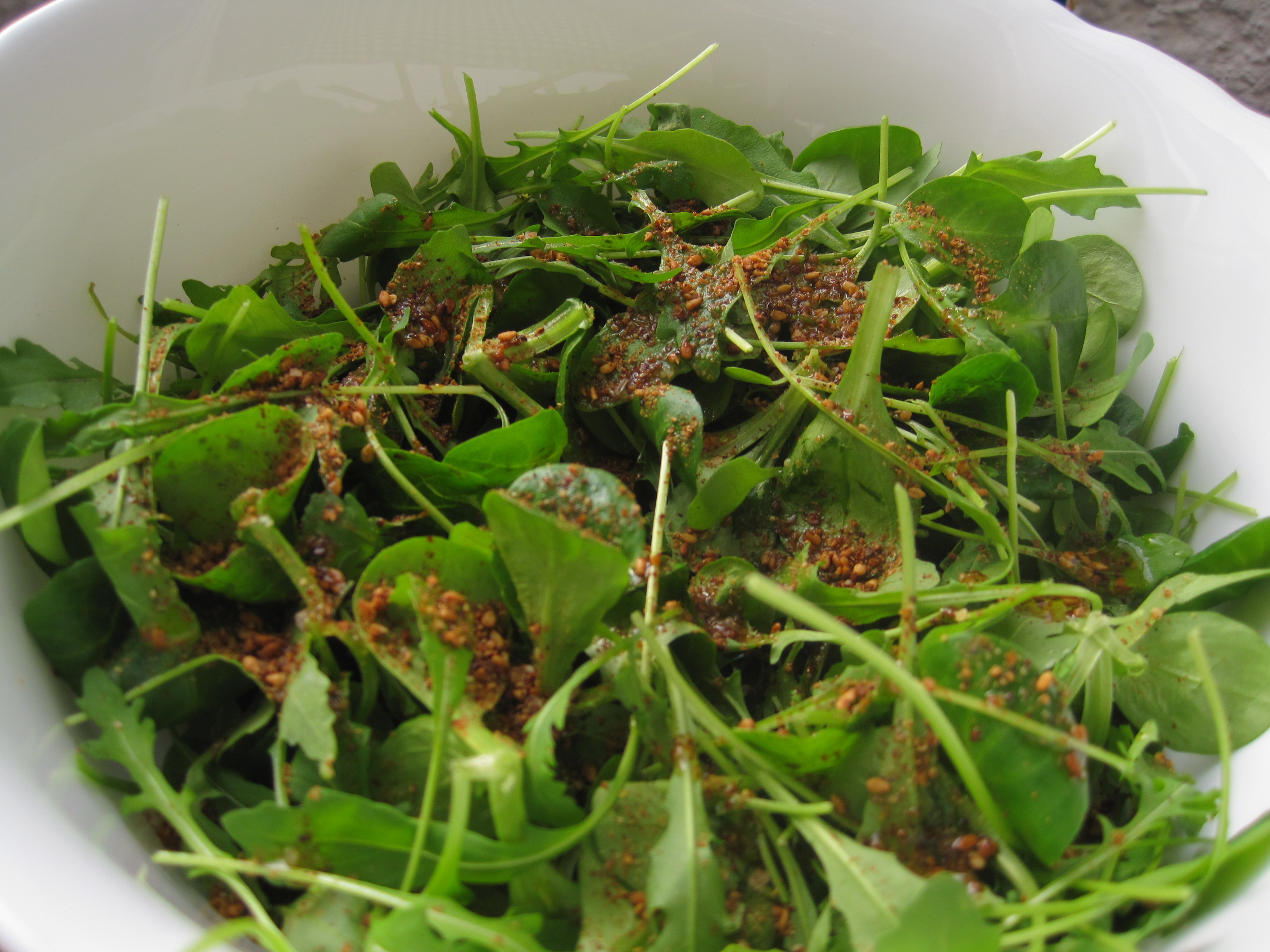 Salata od rukole i matilovca, sa gomasiom i soja sosom.